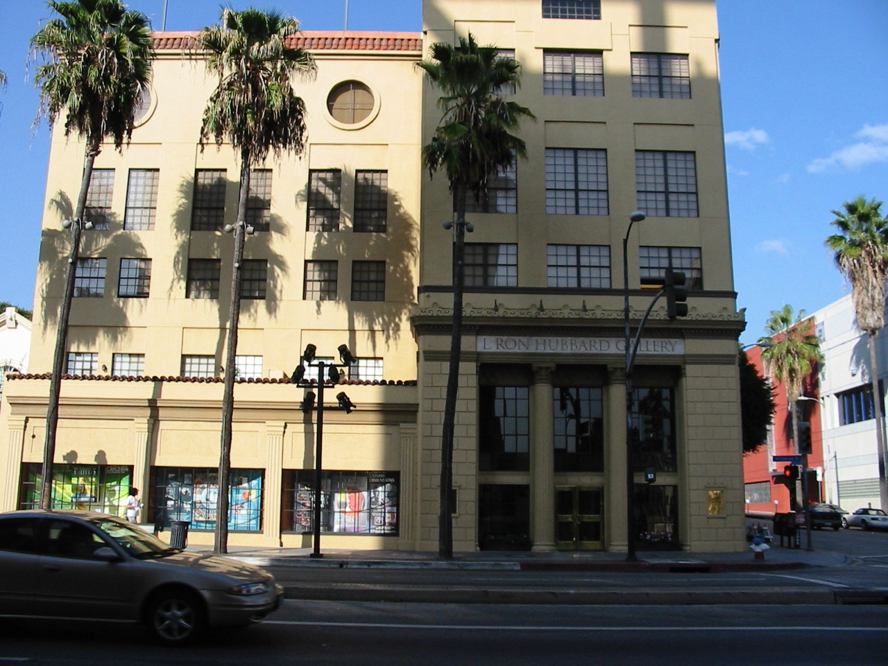 Does an L. Ron Hubbard museum seem strange to you? Yeah...